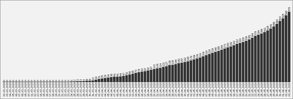 Коронавирус в Саудовской Аравии